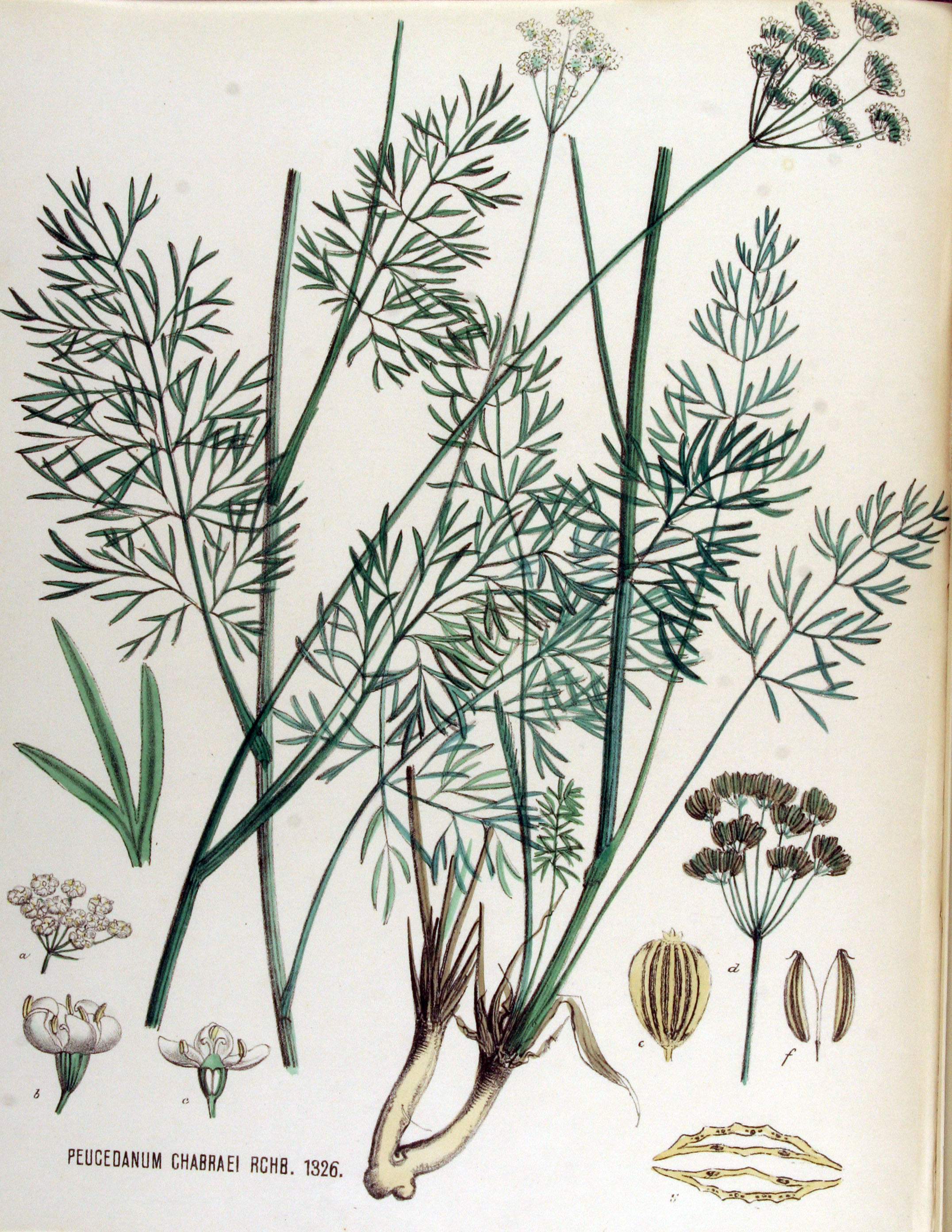 Peucedanum carvifolia Vill. (Syn. Peucedanum chabraei (Jacq.) Reichenb.)